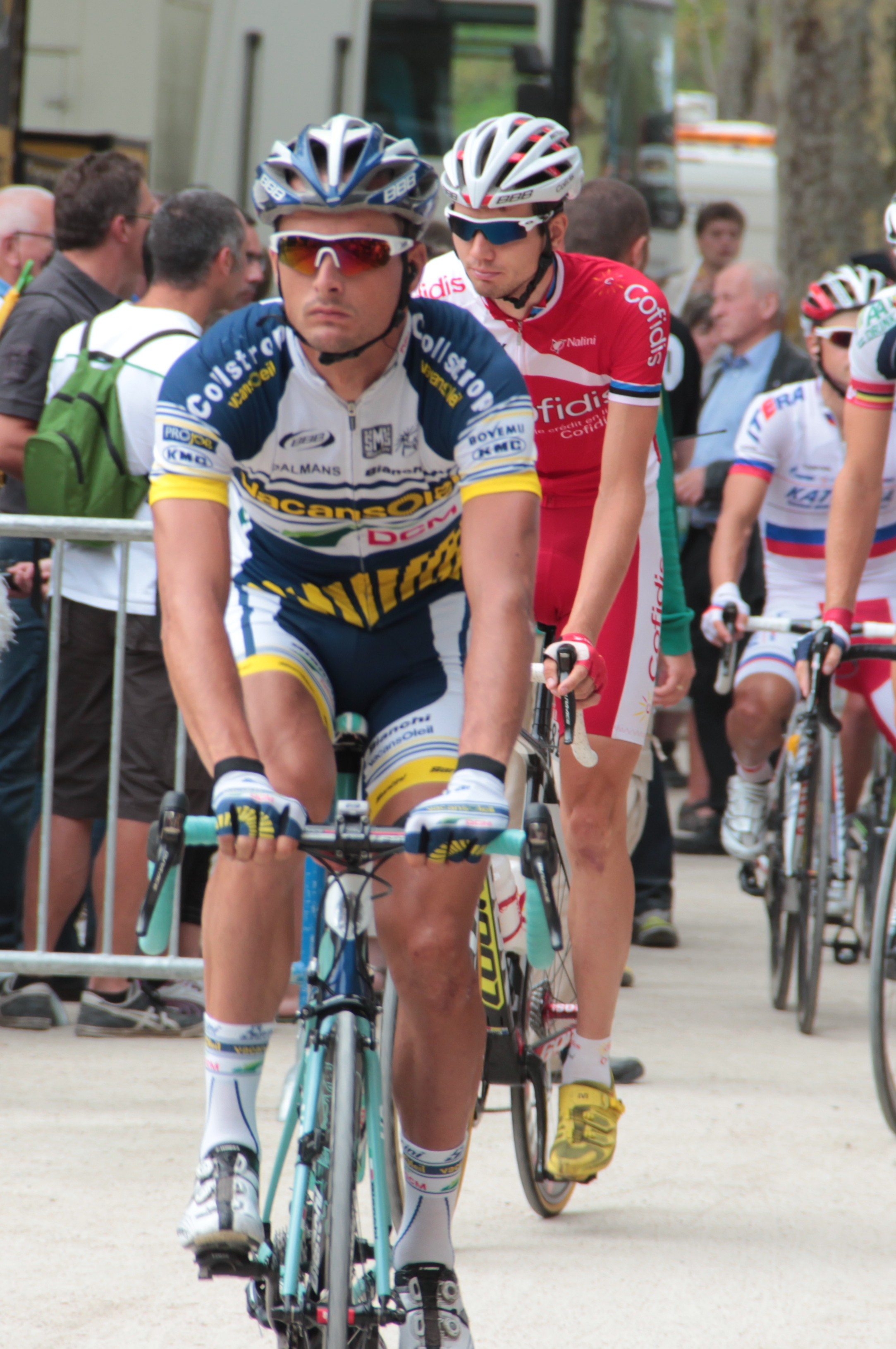 Johnny Hoogerland avant le départ de la 18e étape du Tour de France 2012.